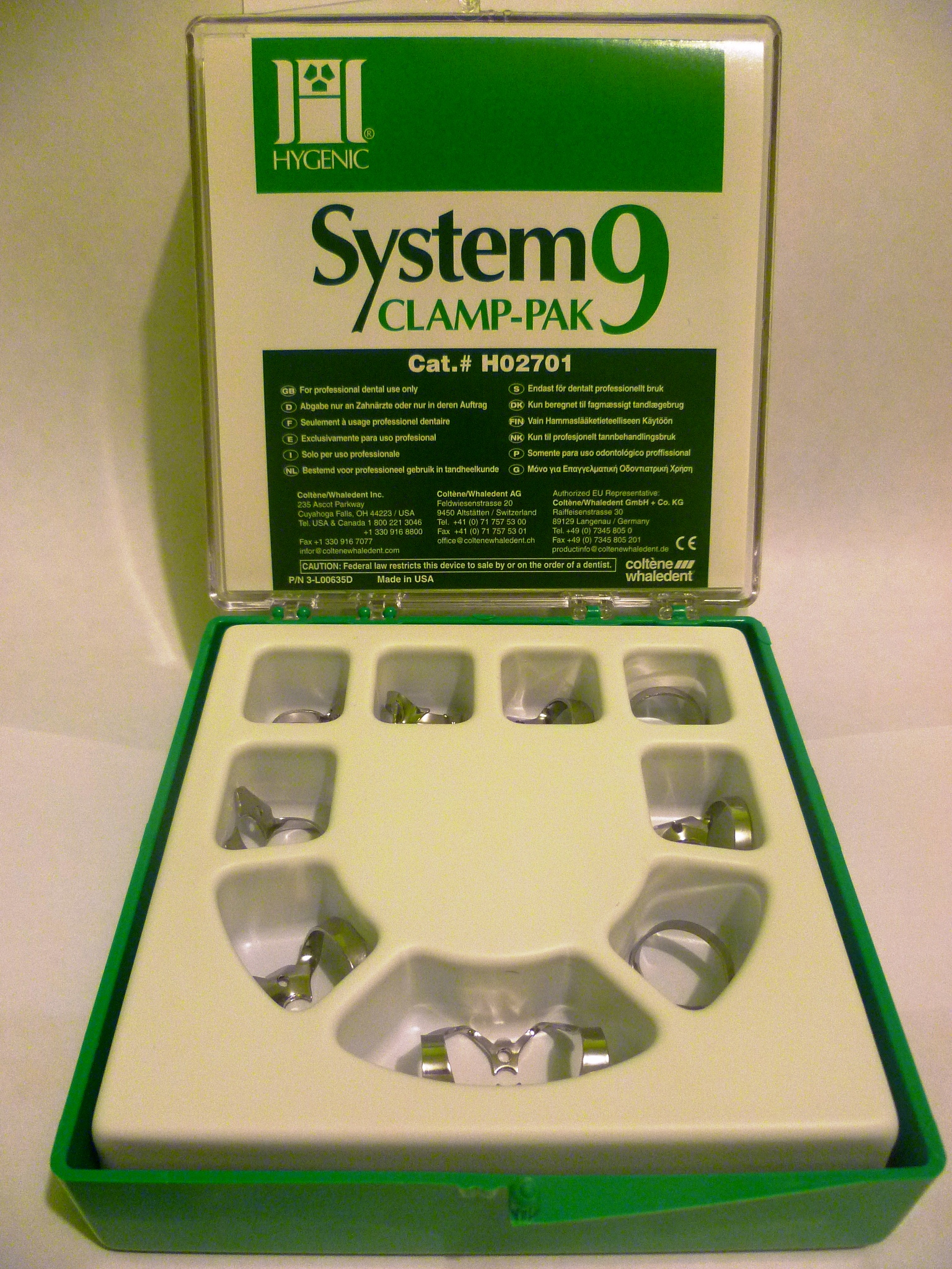 El set de Clamps o grapas usualmente usadas por contener los de uso más frecuente